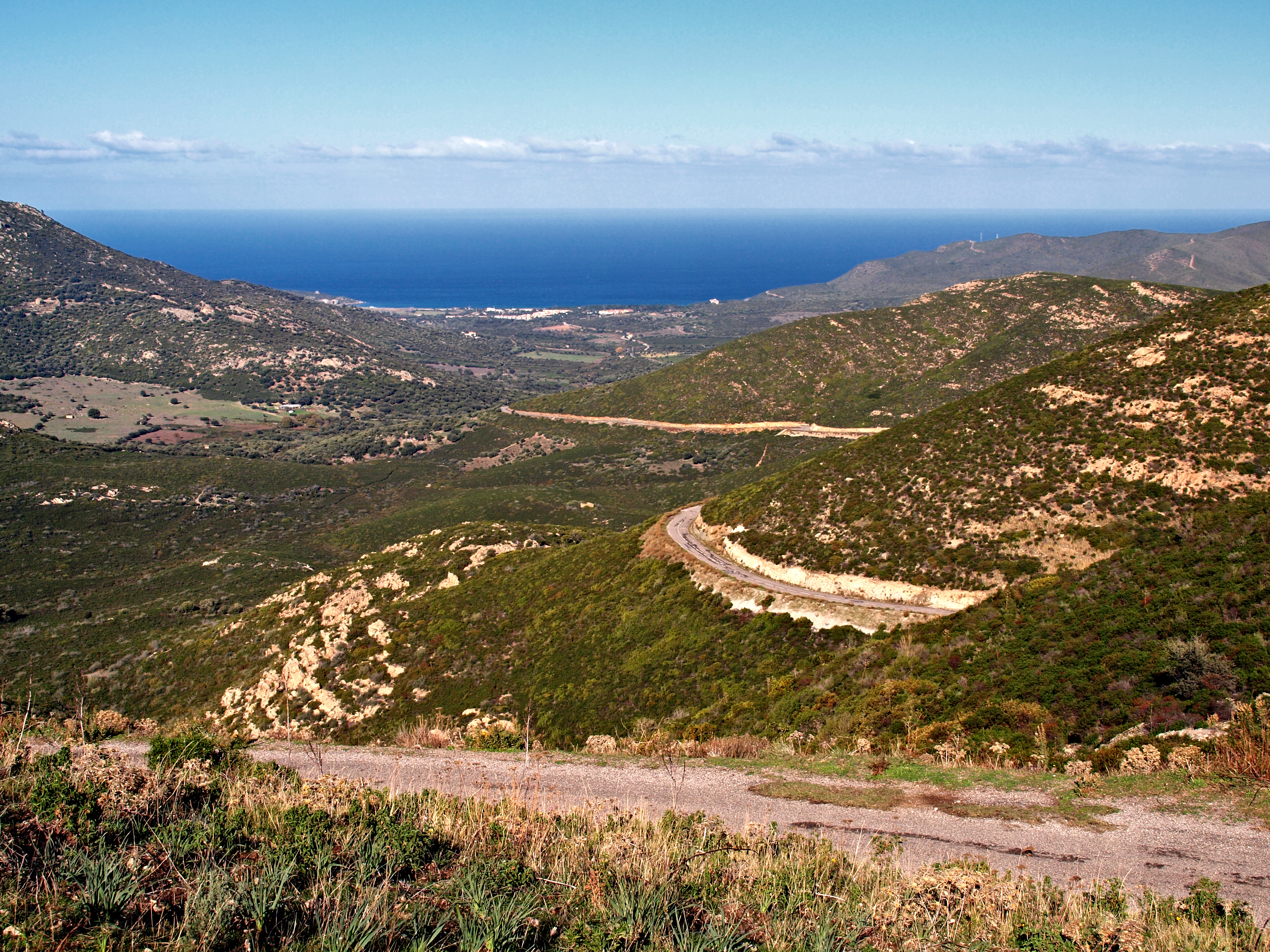 Palasca (Corsica) - La route D363 reliant le village à Lozari